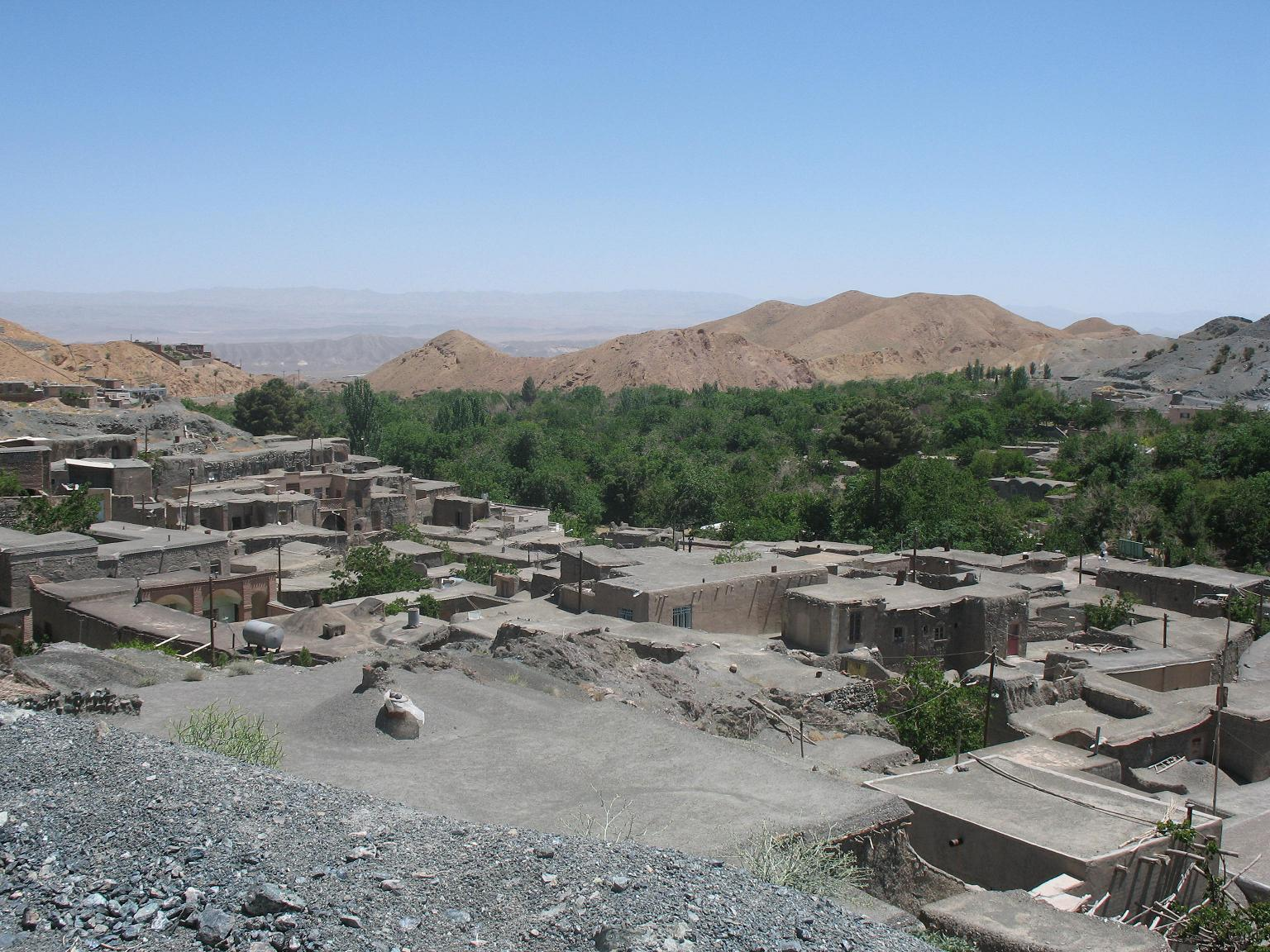 Khorashad Village